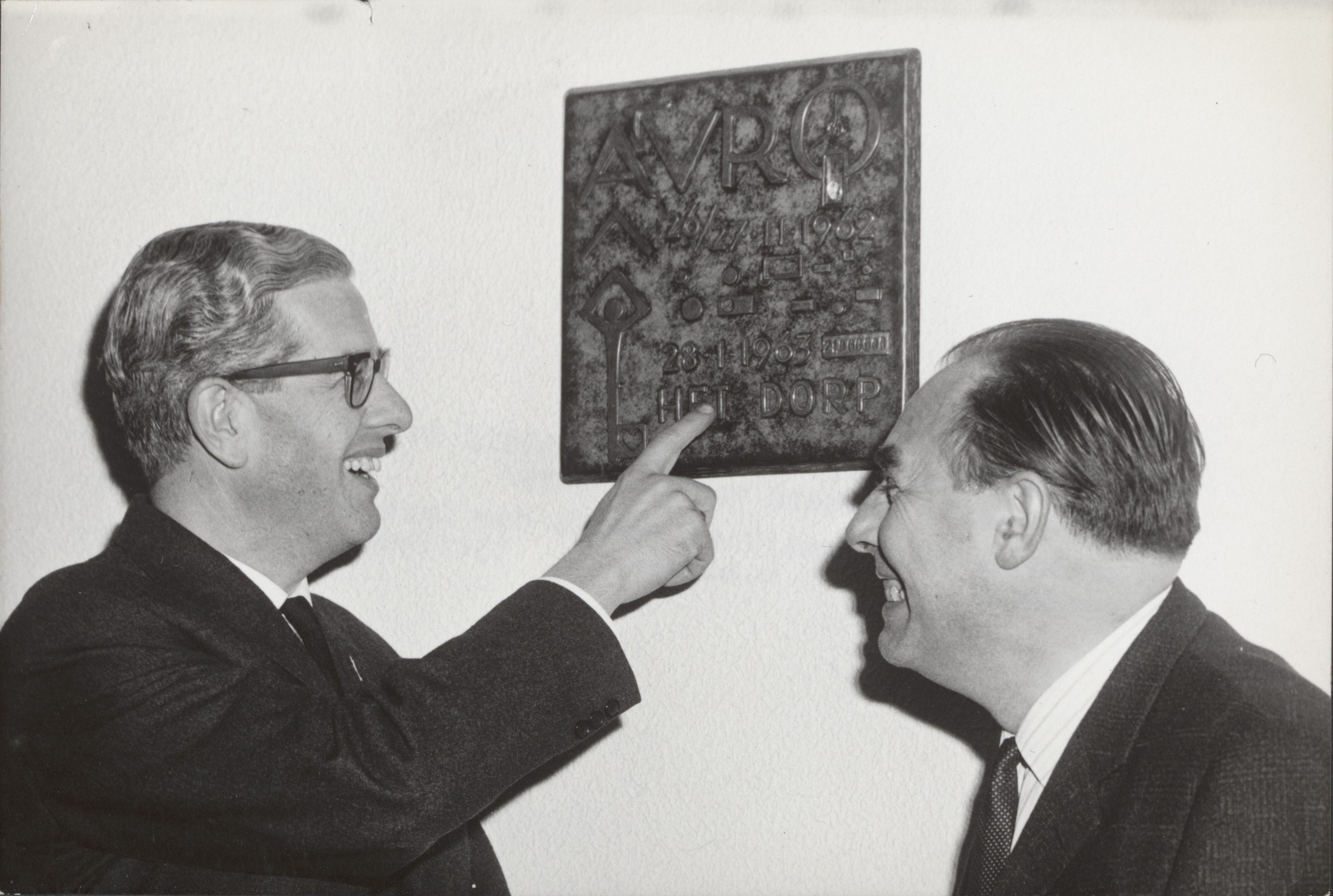 Collectie / Archief : Fotocollectie Elsevier Reportage / Serie : [ onbekend ] Beschrijving : Plaquette van Ons Dorp in AVRO-studio Datum : 13 december 1964 Locatie : Hilversum, Noord-Holland Trefwoorden : gedenktekens, onthullingen Persoonsnaam : Klapwijk, Arie, Luchtenburg, Ger Fotograaf : Bilsen, Joop van / Anefo Auteursrechthebbende : Nationaal Archief Materiaalsoort : Foto (zwart/wit) Nummer archiefinventaris : bekijk toegang 2.24.05.02 Bestanddeelnummer : 091-0740